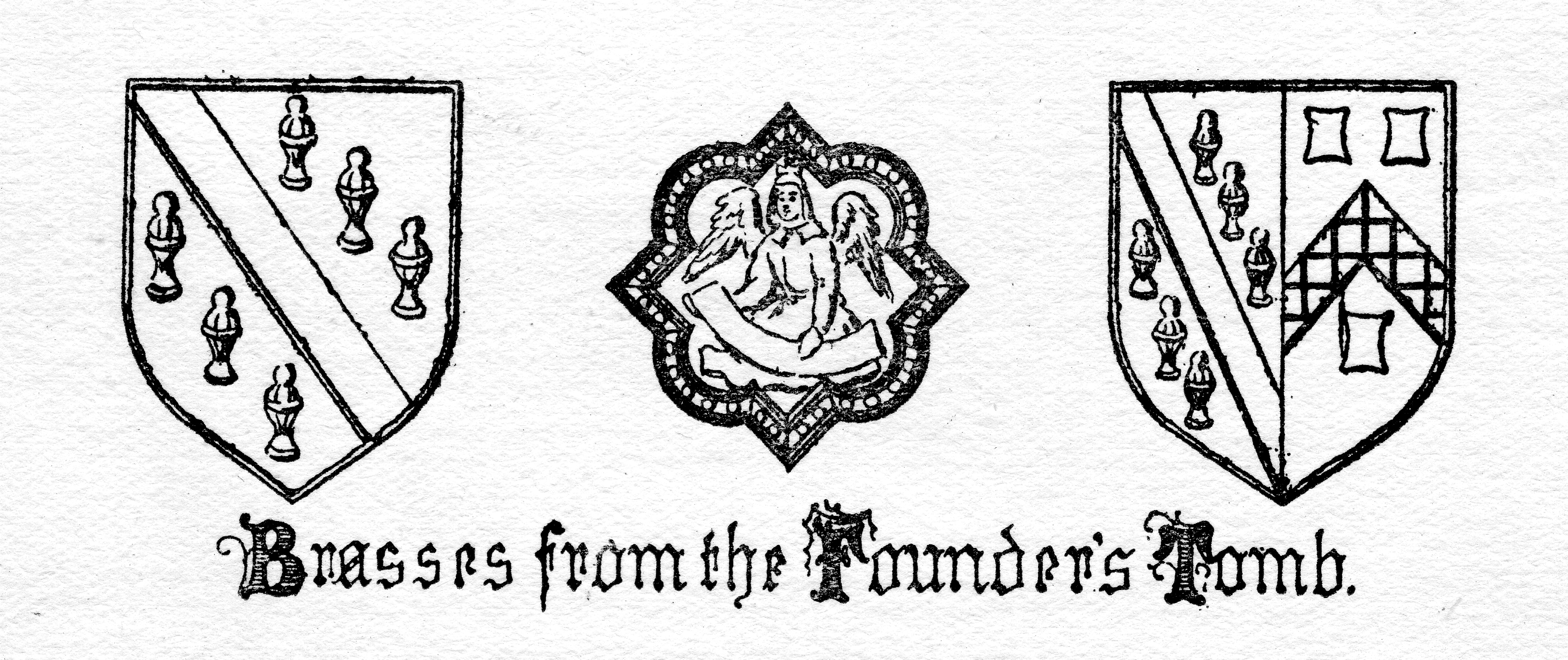 Brasses from the Boteler tombe